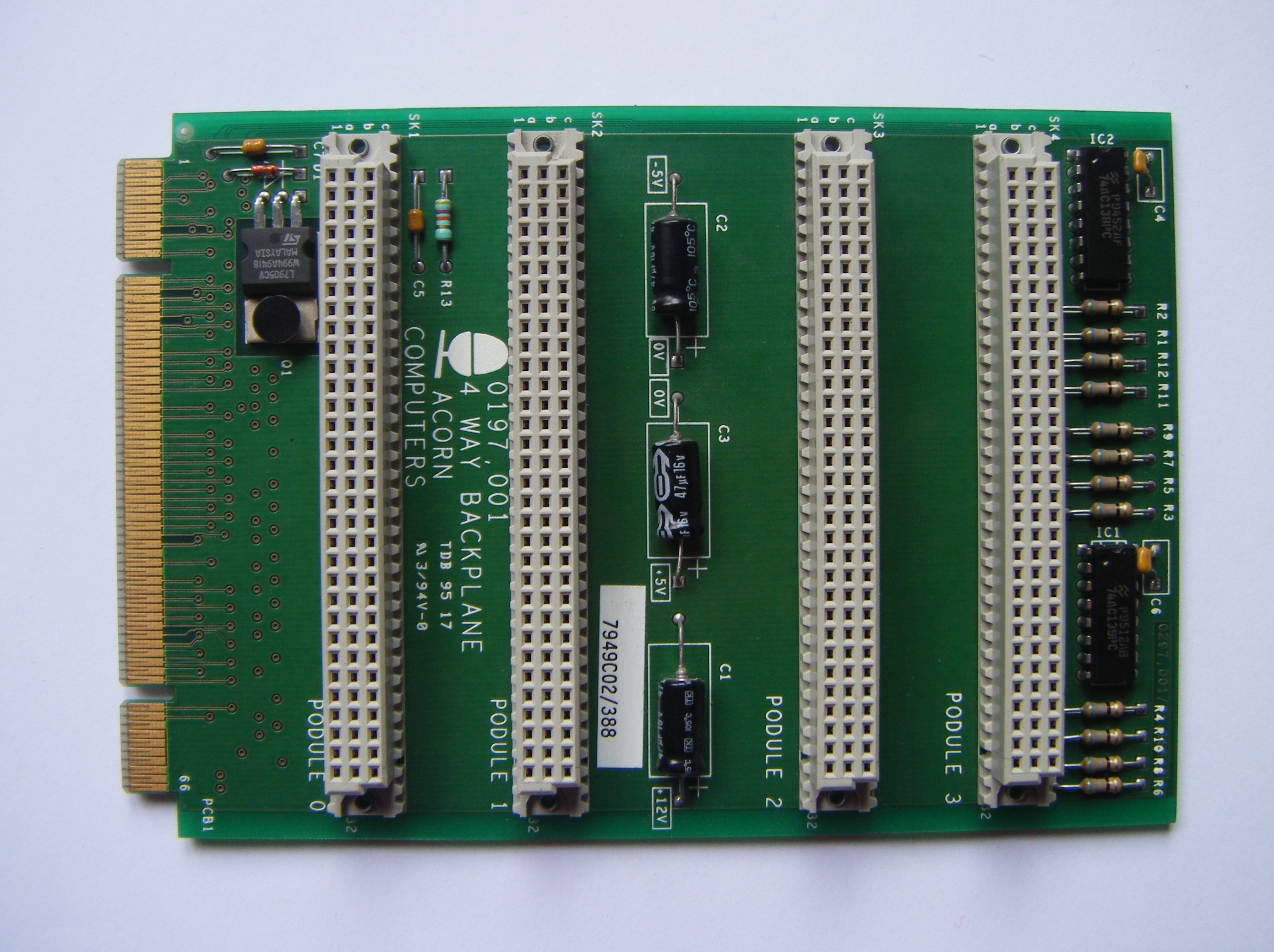 eine 4Slot Erweiterung für Acorn RiscPC, wird benötigt wenn eine Gehäusemodule zusätzlich aufgebaut wird und ersetzt dann die normale 2slot Variante